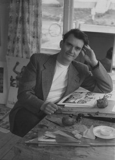 Göte Göransson i egna tecknarateljén (garageateljén) i villan i Täby.